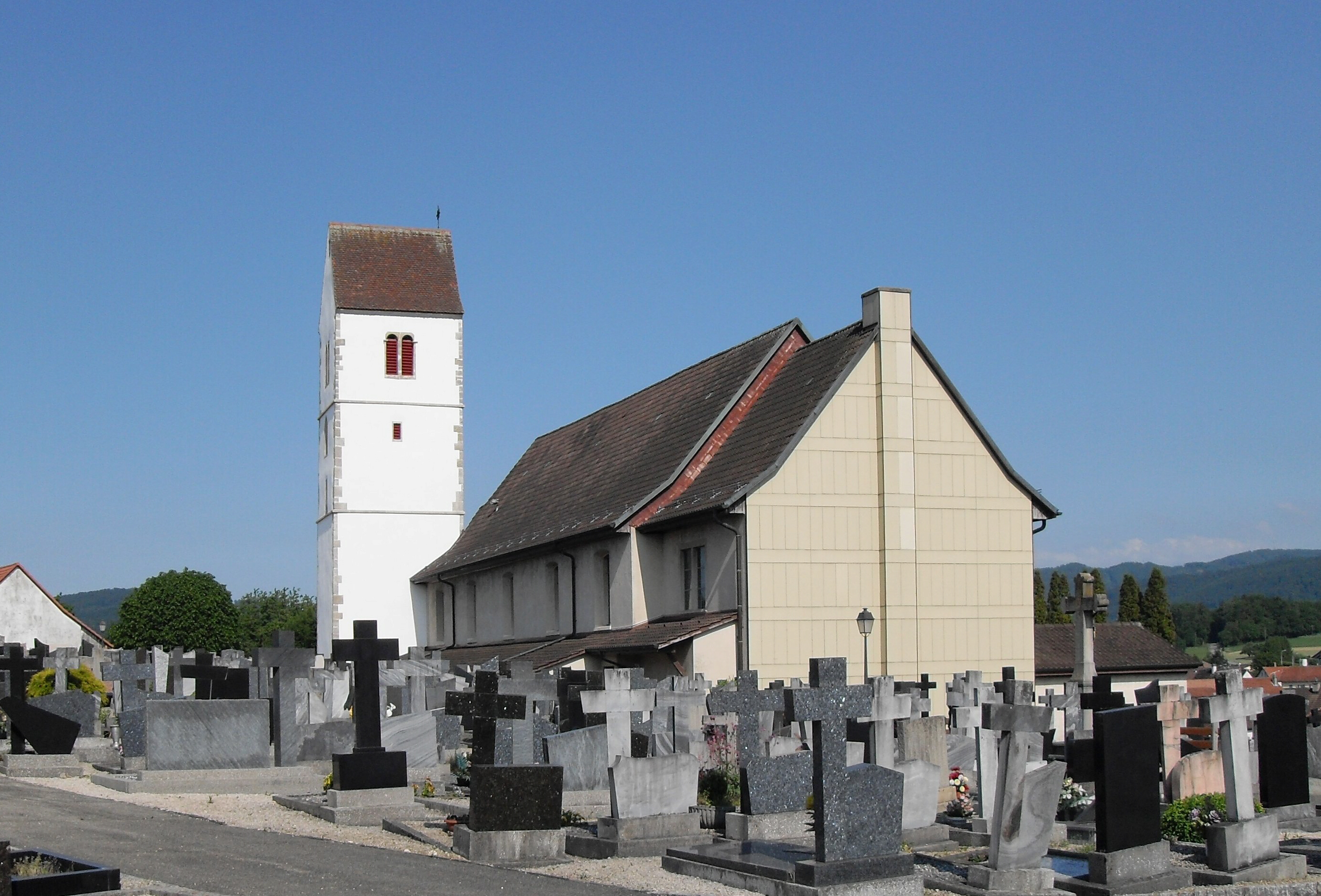 L'église Saint-Jean-Baptiste et cimetière de l'Alle, Suisse